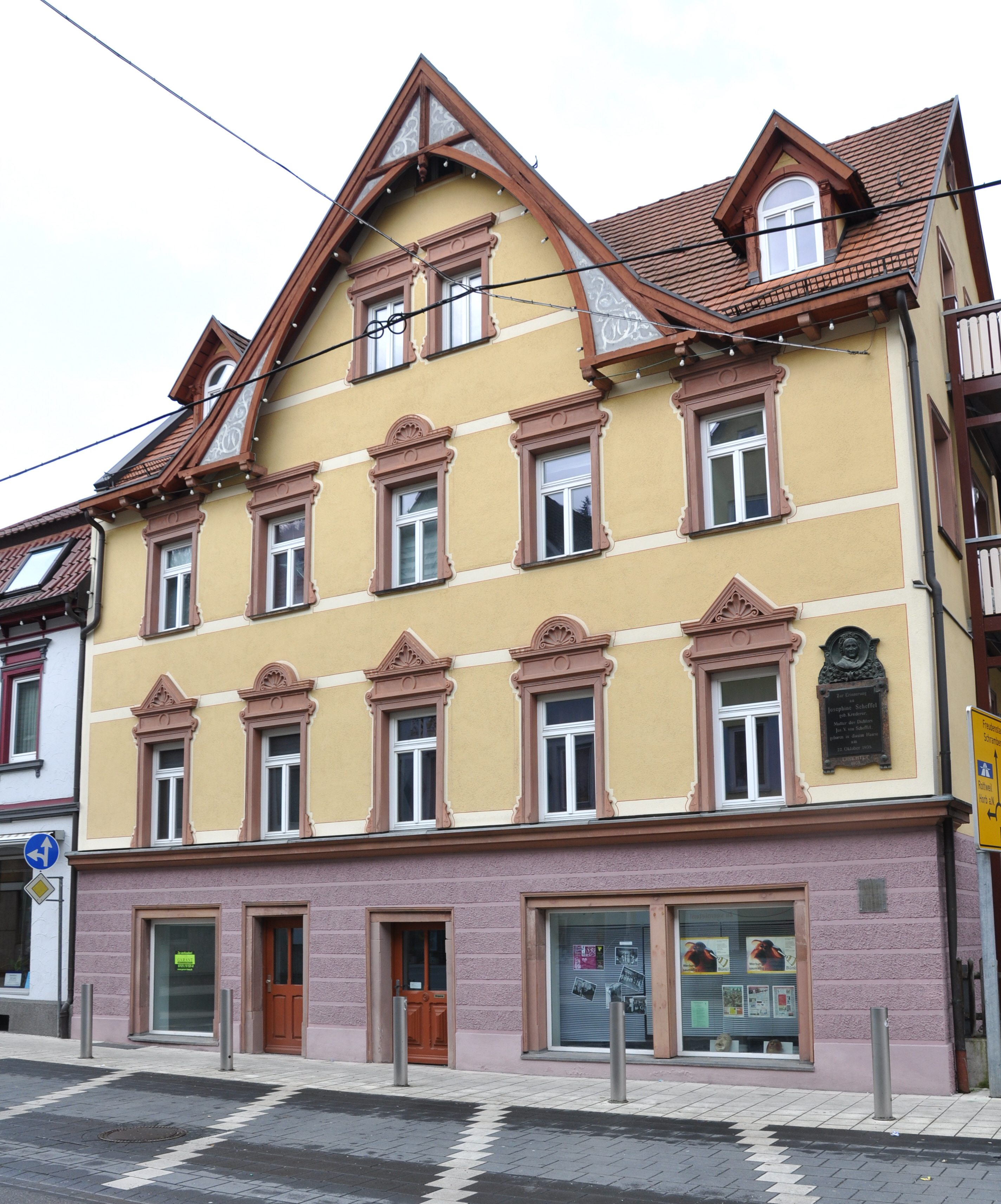 Oberndorf am Neckar, Geburtshaus der Josephine Scheffel, Mutter des Schriftstellers Joseph Victor von Scheffel